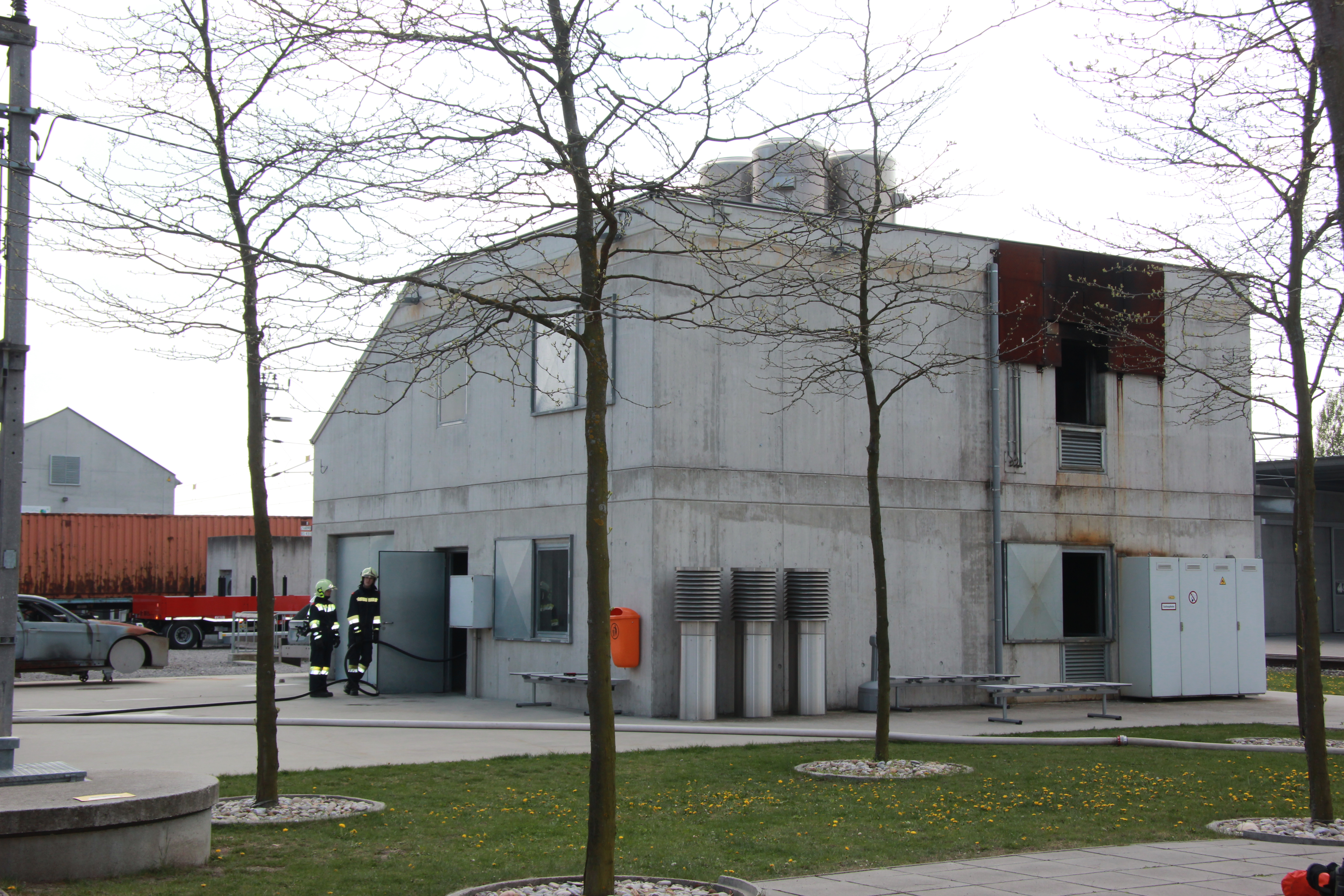 Brandhaus im Übungsdorf in der NÖ Landesfeuerschule Tulln